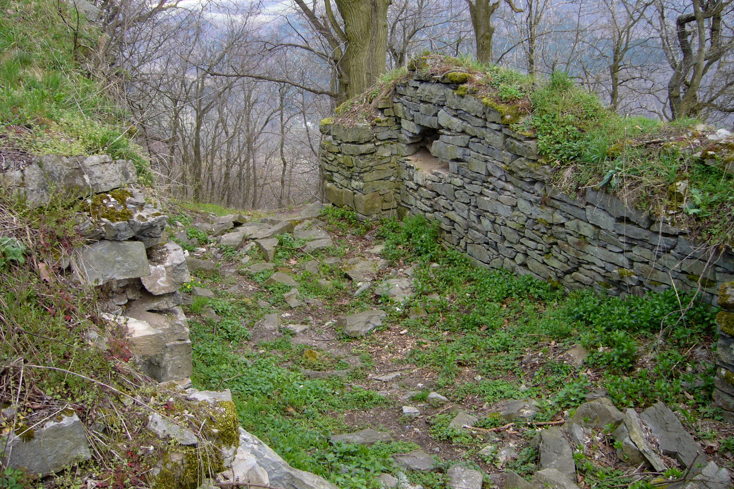 Kalich – průjezd páté brány